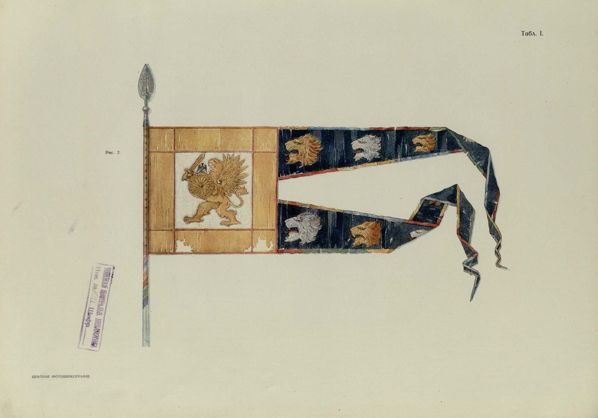 Летописный и Лицевой Изборник Дома Романовых. [В 2-х выпусках]. Издание С.С. Ермолаева под общей редакцией князя М.С. Путятина, художественный отдел под редакцией С.И. Вашкова. Москва, товарищество скоропечатни А.А. Левенсон, [1913]. Летописный и Лицевой Изборник Дома Романовых. Юбилейное издание в ознаменование 300-летия царствования, 1613-1913. [Выпуск А/1]. Москва, Товарищество скоропечатни А.А. Левенсон, [1913]. 113 стр. с многочисленными иллюстрациями, в том числе цветными, 2 роскошных листа с приклеенными цветными фотоцинкографиями — портретами царя и великого князя Михаила Феодоровича и Императора Николая II Александровича, в хромолитографированных с золотом рамках, одна из которых оформлена в виде отдельного накладного листа, 16 л. цветных иллюстраций. Многоцветный титульный лист с изображением первого в Романовской династии царя и великого князя Михаила Феодоровича, «всея великия России самодержец», изображенный со скипетром и державой — С.И. Вашкова. Заставки и буквицы — Б.В. Зворыкина. Рамки к портретам царя Михаила Фёдоровича и Императора Николая II — С.И. Ягужинского. Блок на «толстой бумаге» разных дорогостоящих сортов вплоть до тонкого картона. В цветном с серебротисненной рамкой картонажном печатном издательском переплёте, оформленном Б.В. Зворыкиным. Узорные печатные форзацы. Формат: 46x33 см.